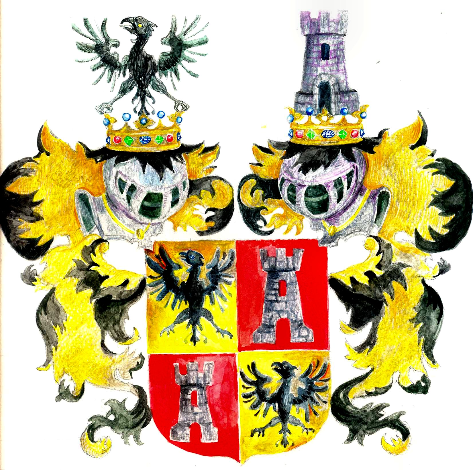 Wappen der Familie von Carlsburg, Aquarell 22x30cm, gemalt von Sebastian Rascher von Carlsburg